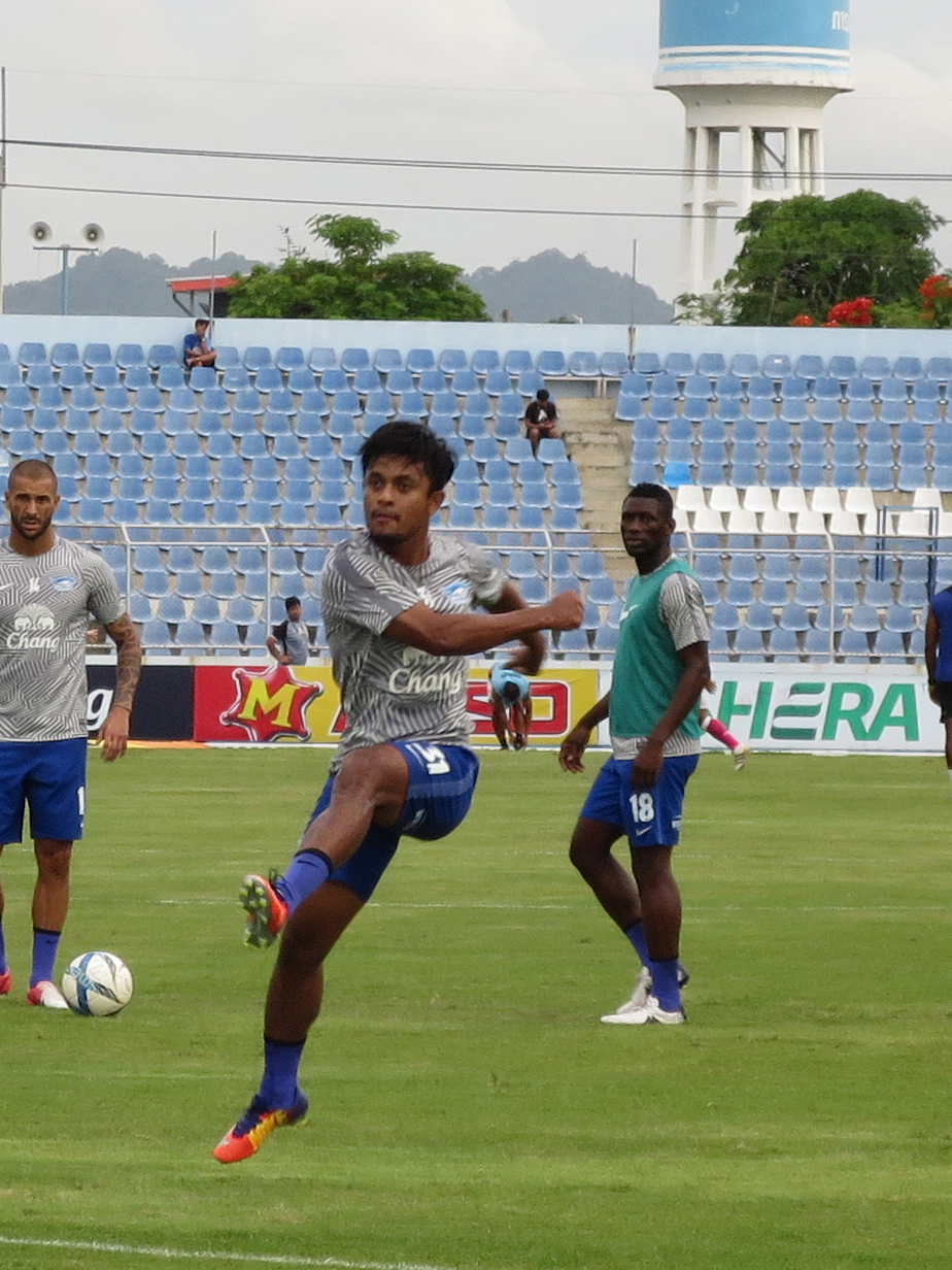 Nurul Sriyankem (2017)